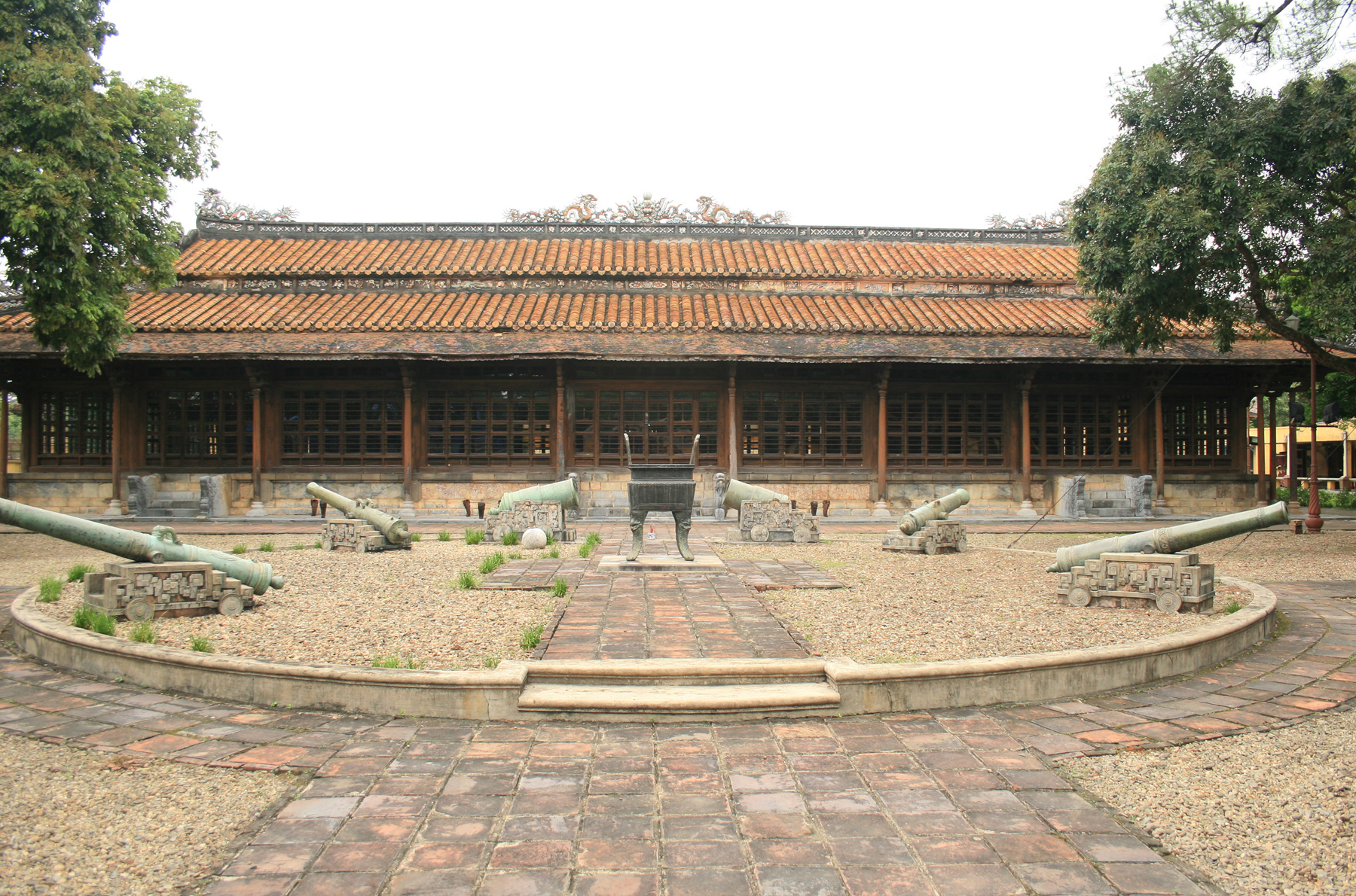 Bảo tàng Mỹ thuật Cung đình Huế